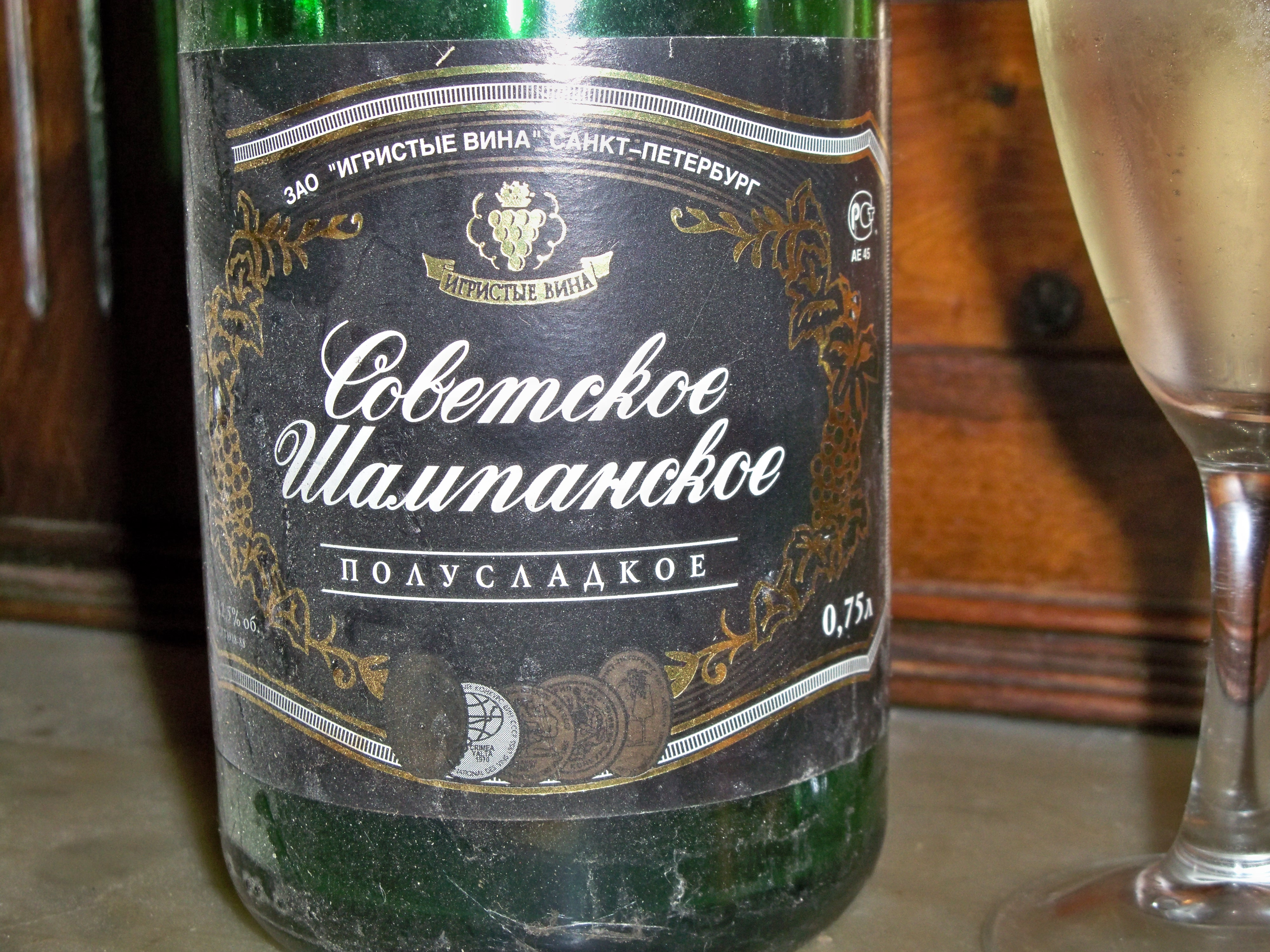 étiquette de Sovetskoïe champanskoïe (litt. «Champagne soviétique»), Russie : Vins mousseux de Saint-Pétersbourg ; Demi - doux